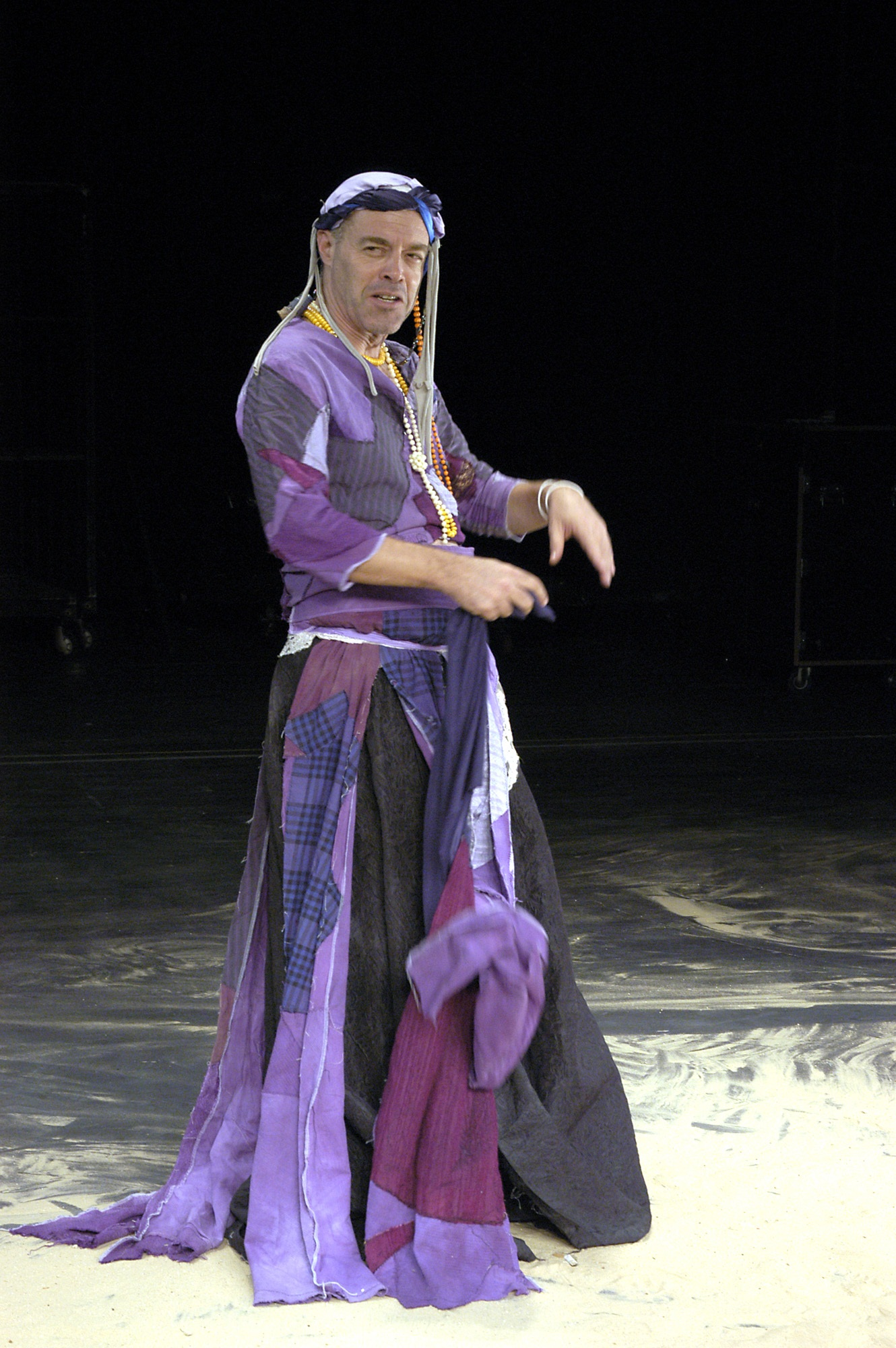 דורון תבורי בהצגה "הפרגודים", מאת ז'אן ז'אנה, בבימויה של אופירה הניג, בתיאטרון הבימה